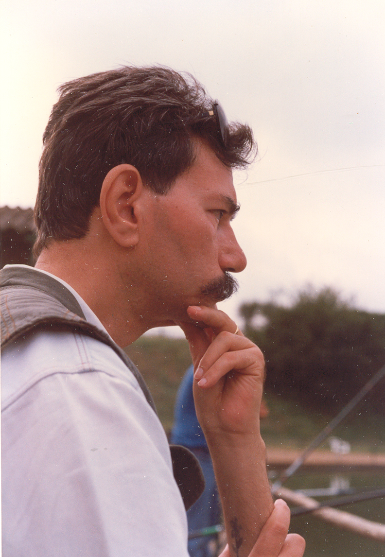 Dal sito dell'Associazione Luca Coscioni ( che rilascia le immagini con licenza Creative Commons "cc-by-2.0-it" (